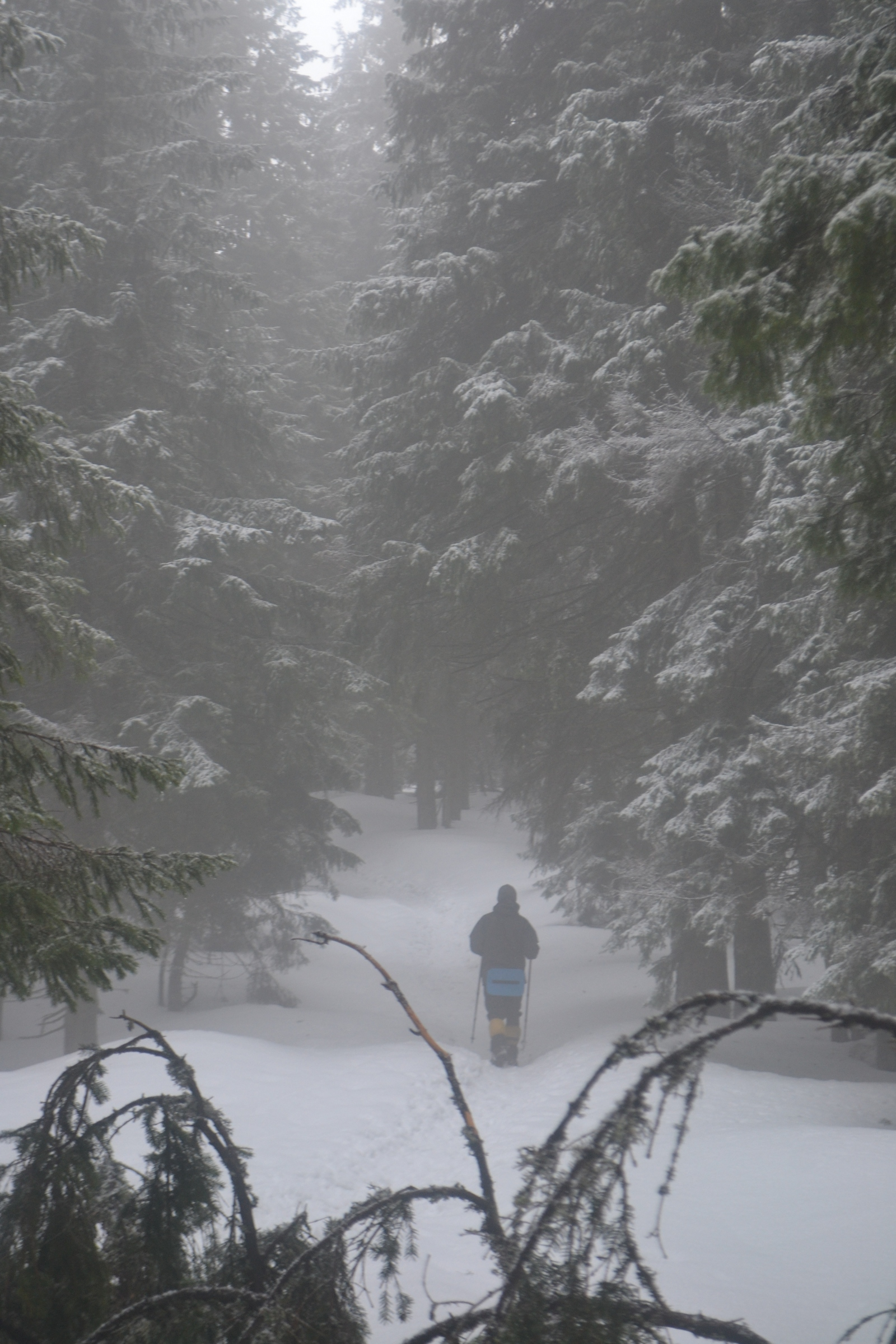 Чорногірський хребет - підйом на Піп Іван